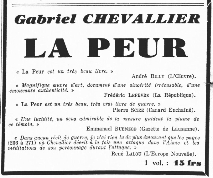 Annonce commerciale pour le livre de Gabriel Chevallier, "La Peur", le 17 janvier 1931 dans "Les Nouvelles littéraires".